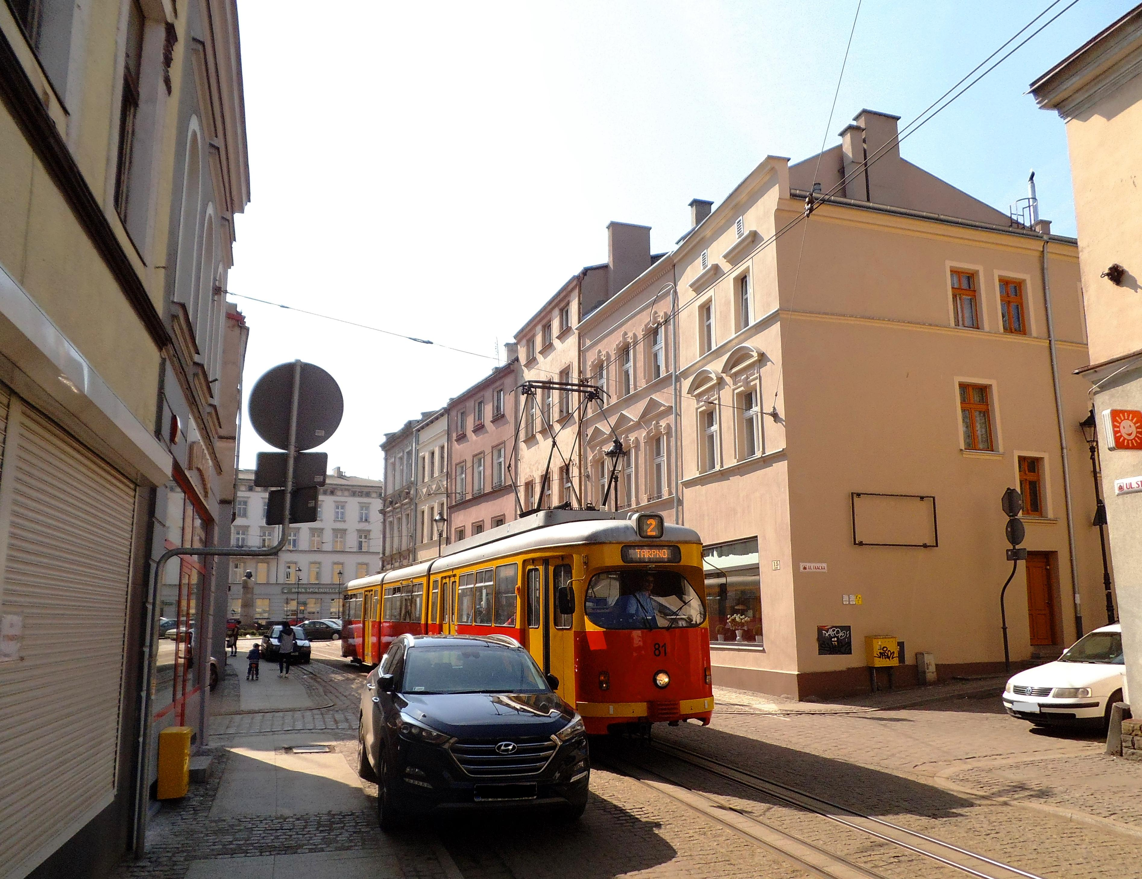 Ulica Stara w Grudziądzu